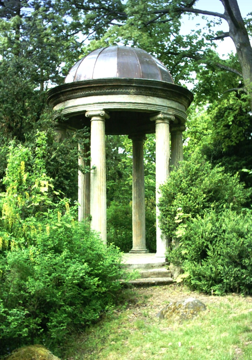 Schloss Hohenstein bei Coburg, Monopteros im Schlosspark Quelle: selbst fotografiert Fotograf/Zeichner: presse03 Datum: 14.05.2006